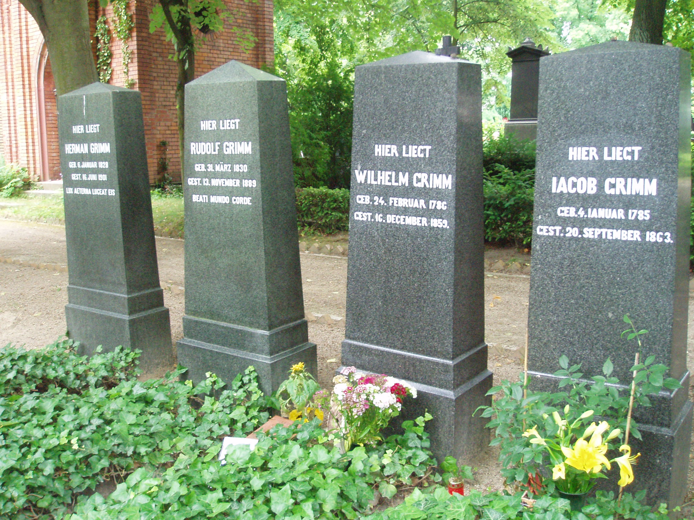 Graves Grimm brothers